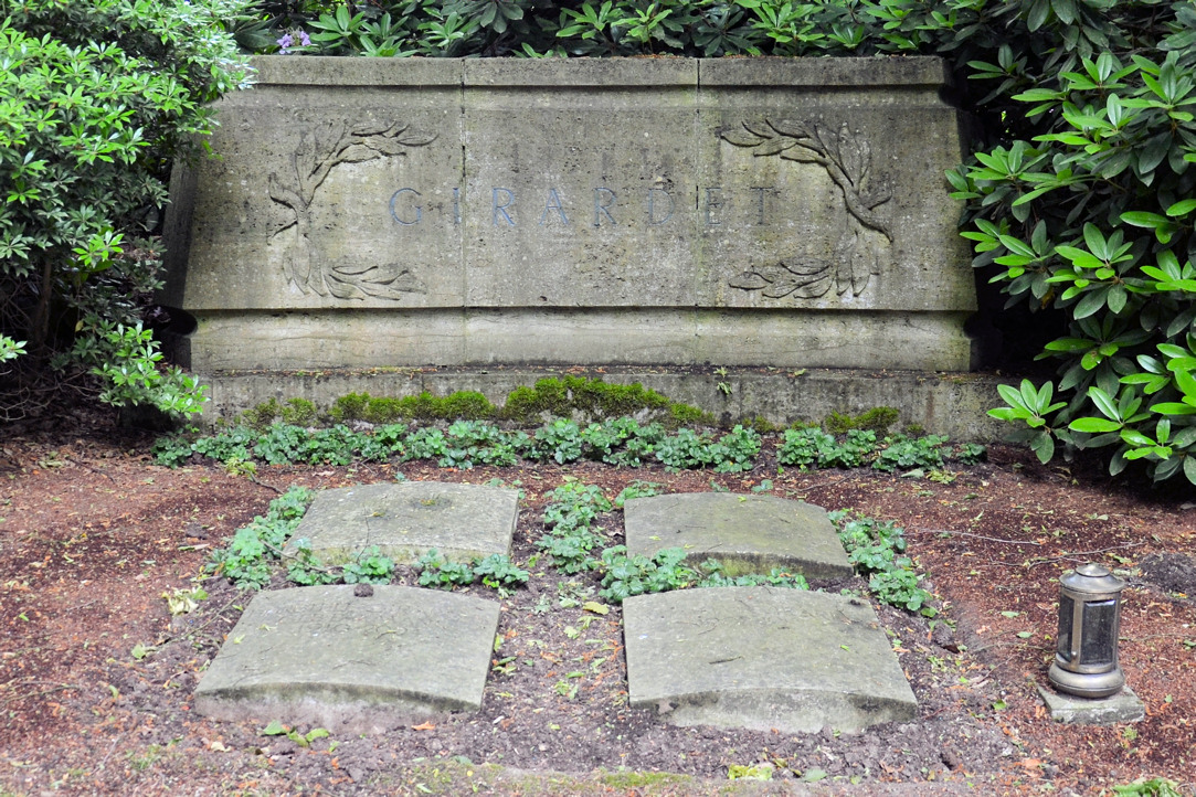 Grabmal des Druckereibesitzers und Verlegers Wilhelm Girardet (*15.11.1874 in Essen; † 16.06.1953 in Essen) und seines Sohnes Herbert Girardet (* 12.07.1910 in Essen; † 6.10.1972 in Unterjoch) auf dem Südwestfriedhof in Essen